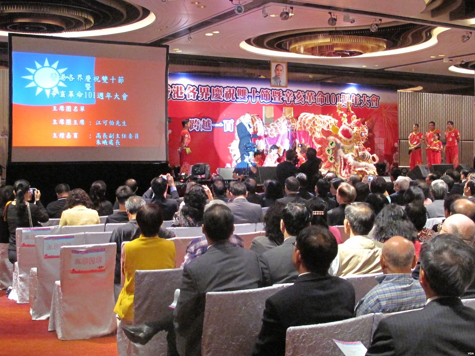 香港台湾社团庆祝双十节(美国之音记者 黎堡拍摄)